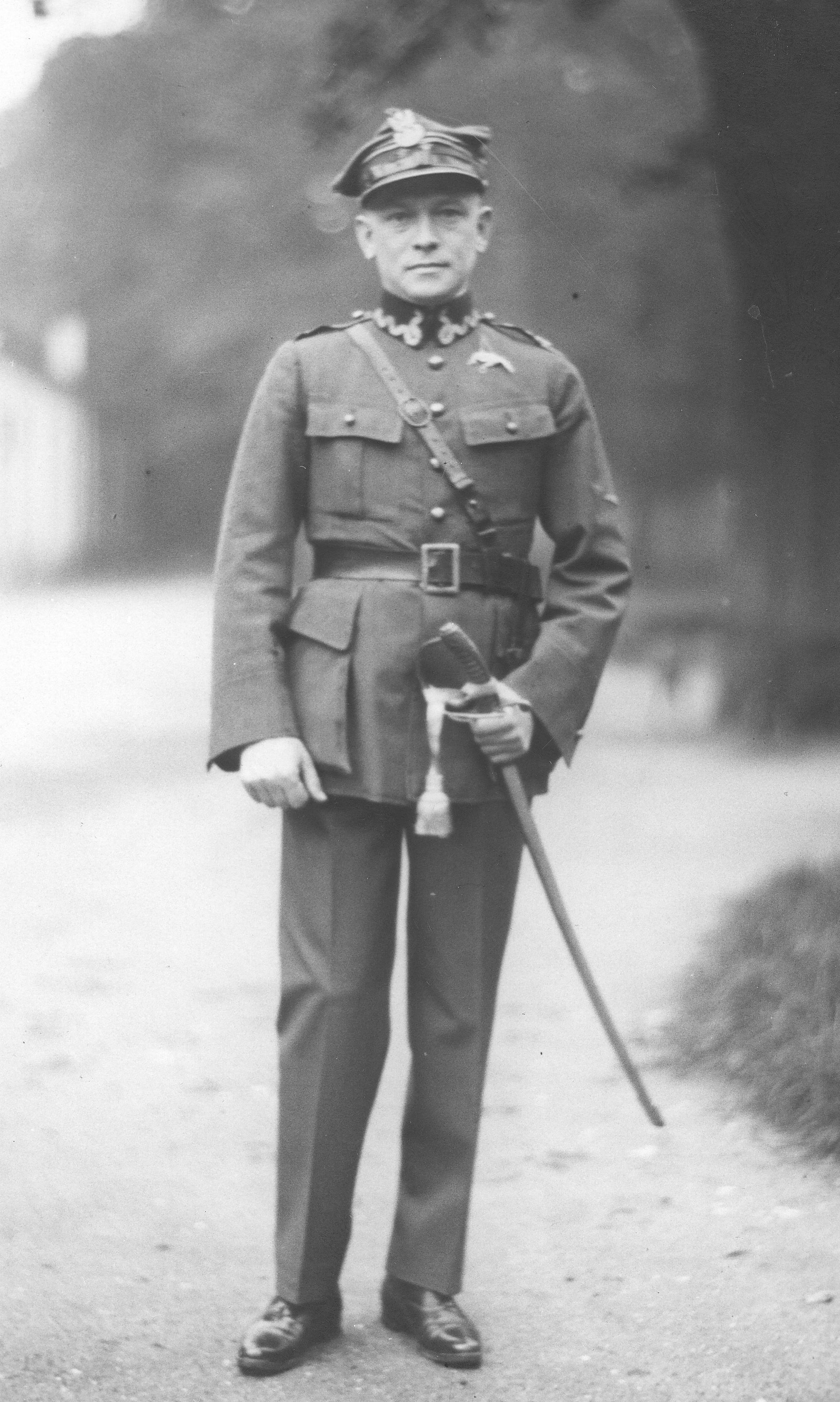 Podpułkownik pilot Ernest Cieślewski, dowódca 2 Pułku Lotniczego w Krakowie. Koncern Ilustrowany Kurier Codzienny - Archiwum Ilustracji. Sygnatura: 1-W-48